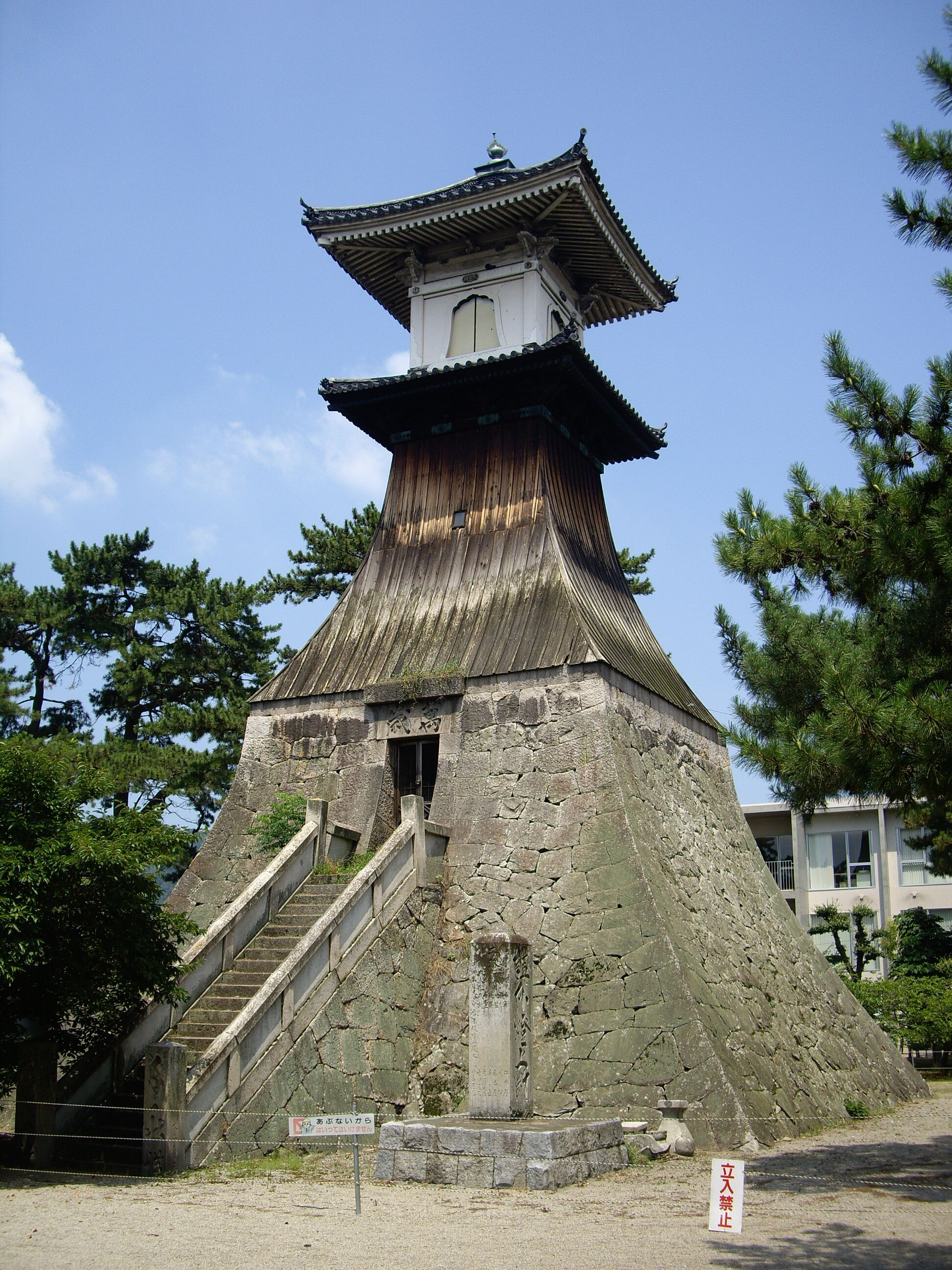 高燈篭 - 香川県琴平町にある灯籠